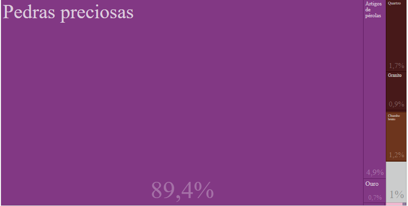 Treemap das principais exportações do município de Governador Valadares, em Minas Gerais